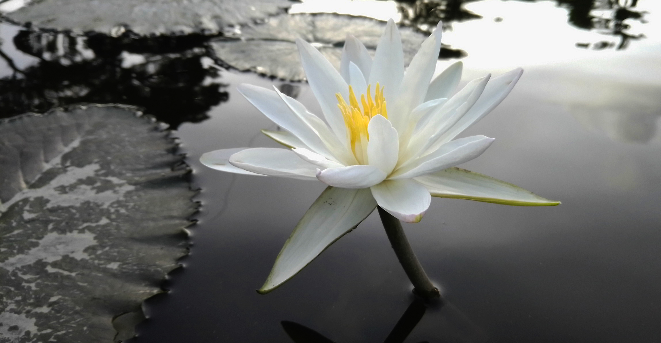 সাদা শাপলা